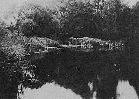 Беларуская (тарашкевіца): Пышна (Pyšna), сядзіба Сяляваў (Sialava). Парк